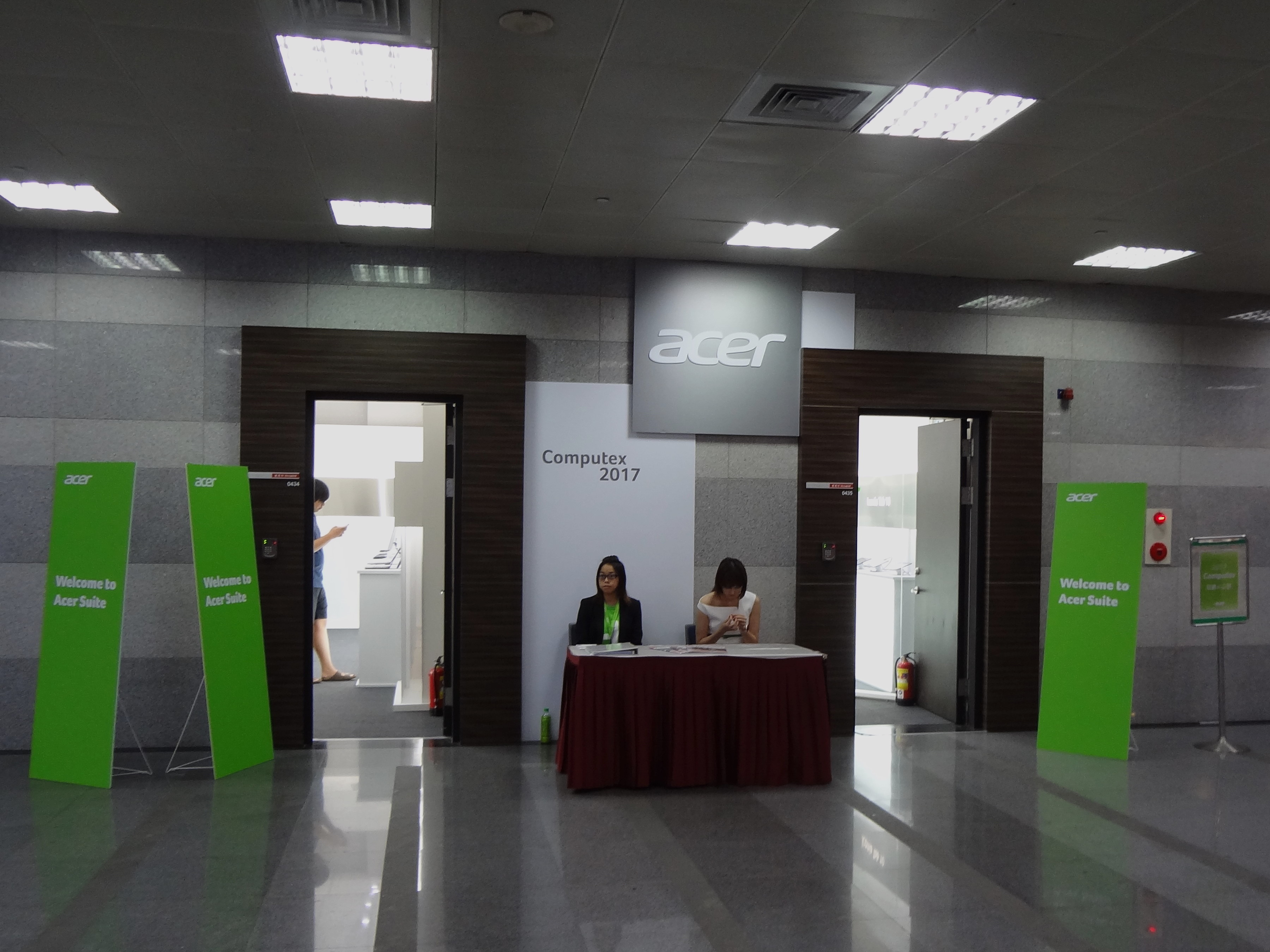 2017台北國際電腦展，宏碁於台北南港展覽館設置的Acer Suite。